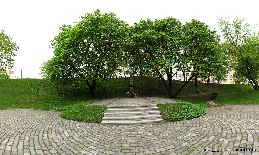 Меморильный комплекс "Яма"